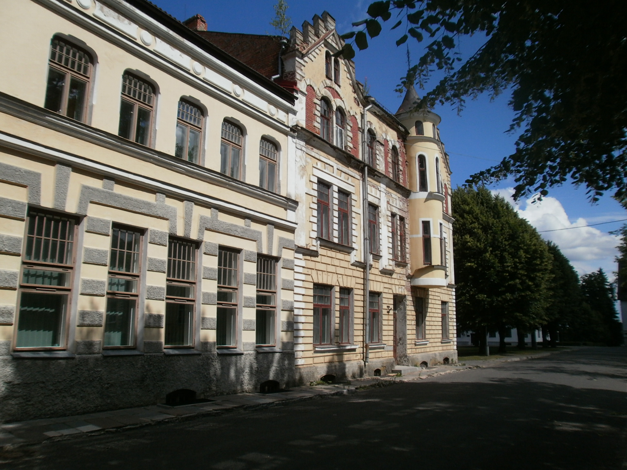 Vaade Viljandi muuseumi eest.